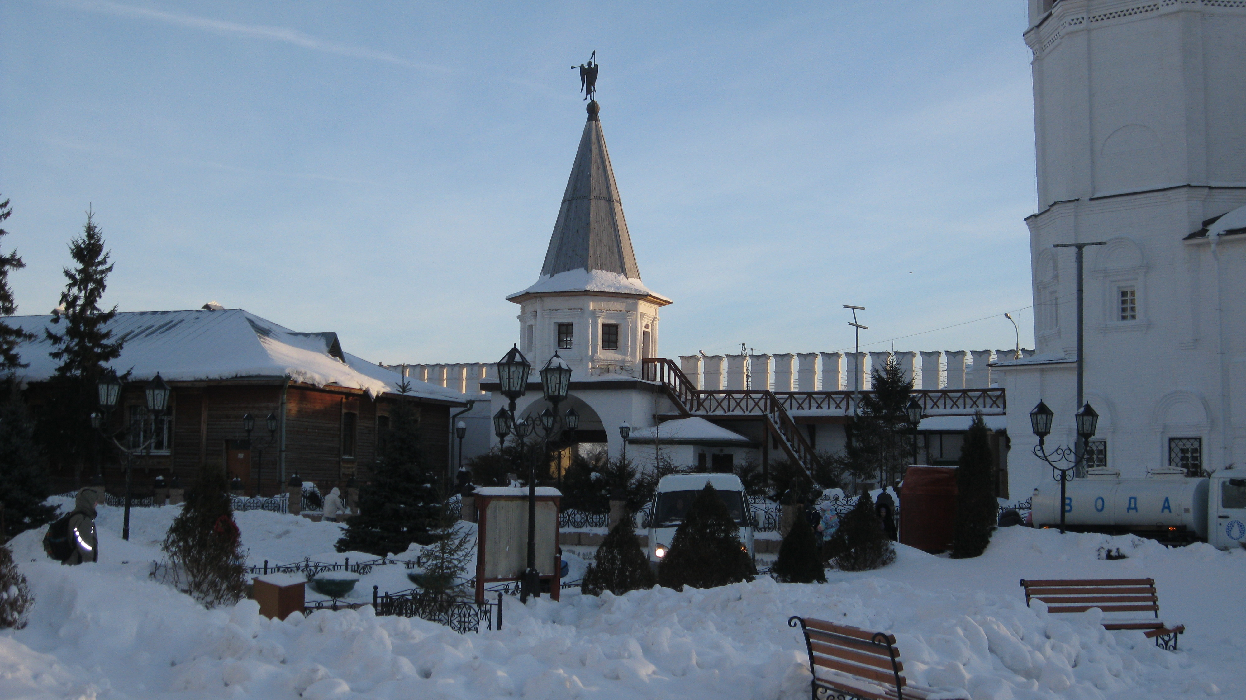 Вид на ворота Троицкого монастыря в Тюмень с северной стороны (внутренний двор)